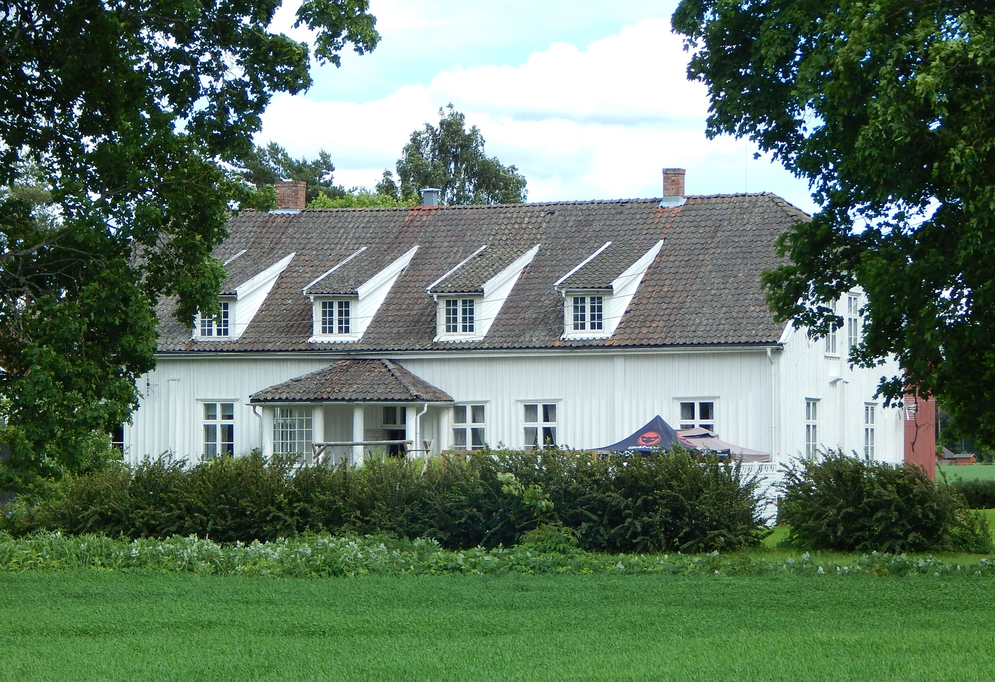 Sørum prestegård (Huseby)